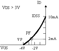 Caractéristique Id/Vgs typique d'un JFET.